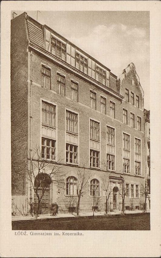 Prawdopodobnie jest to najstarsza fotografia budynku I Liceum Ogólnokształcącego im. M. Kopernika w Łodzi